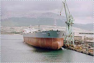 Foto der Schiffswerft Brodosplit